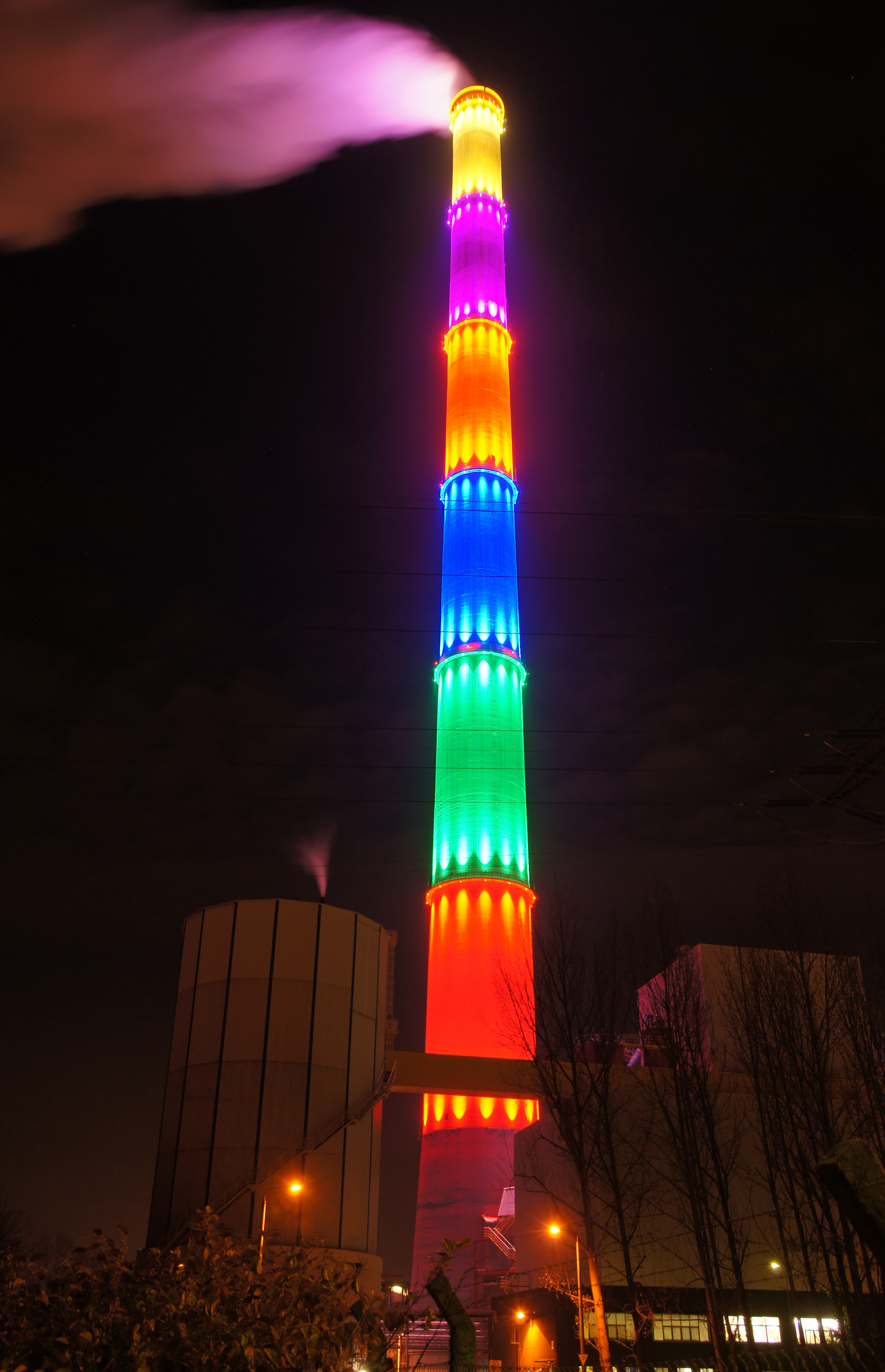 Heizkraftwerk Chemnitz-Nord bei Nacht